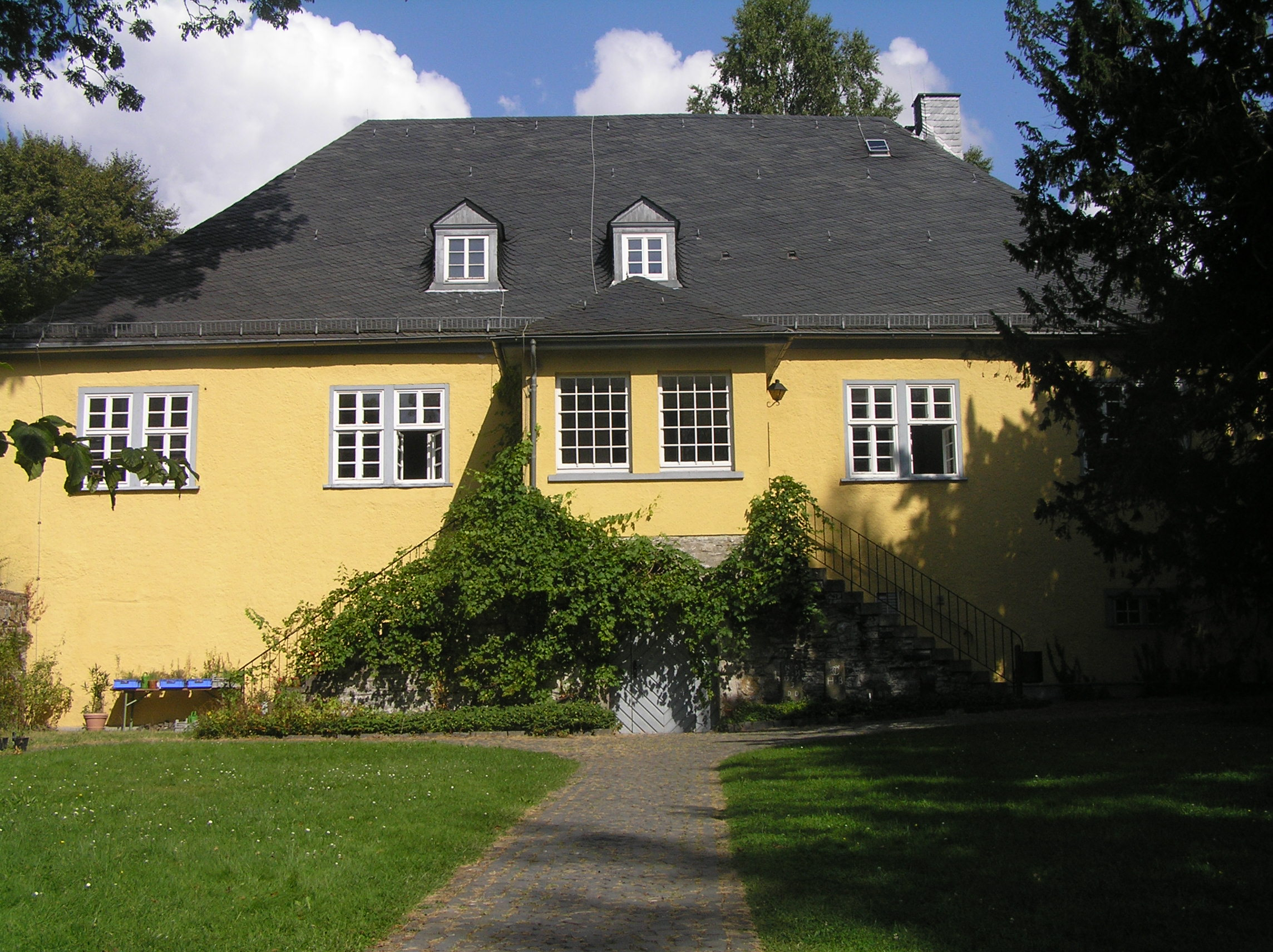 Hofgarten-Haus; Teil des Landschaftsmuseum Westerwald in Hachenburg. Im Gebäude sind neben der Museumsverwaltung das Münzkabinett und die archäologischen Funde ausgestellt